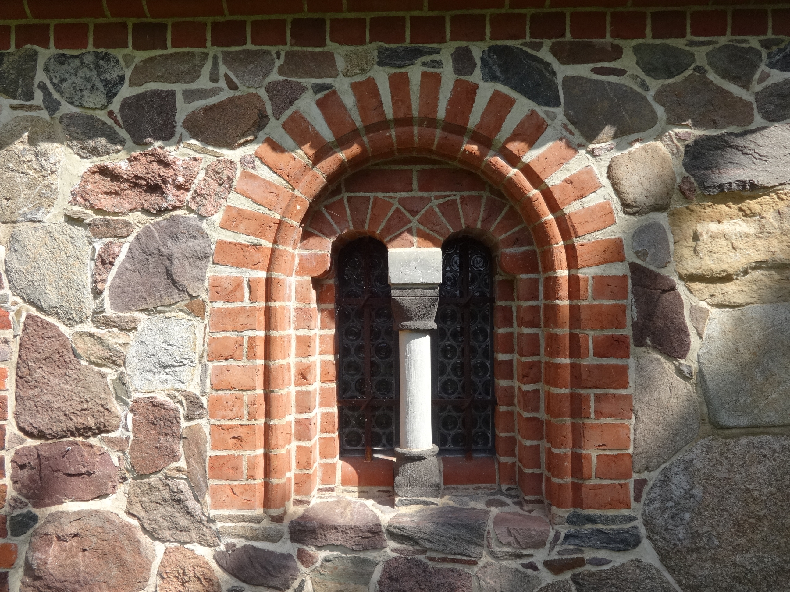 Die Dorfkirche Wildau-Wentdorf ist eine gotische Feldsteinkirche aus dem 13. Jahrhundert, die zu einem späteren Zeitpunkt barock überformt wurde. Im Innern befinden sich eien Kanzel aus dem 17. Jahrhundert, ein Taufbecken aus dem Jahr 1588 sowie eine Dinse-Orgel.